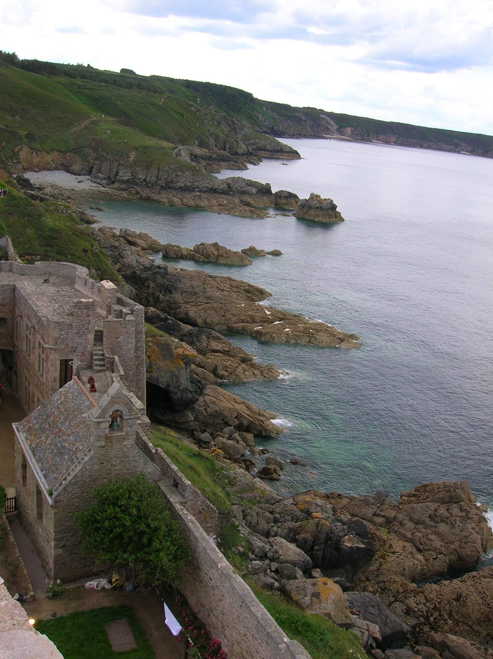 Fort La Latte, Côtes d'Armor, France : la côte ouest (west coast)